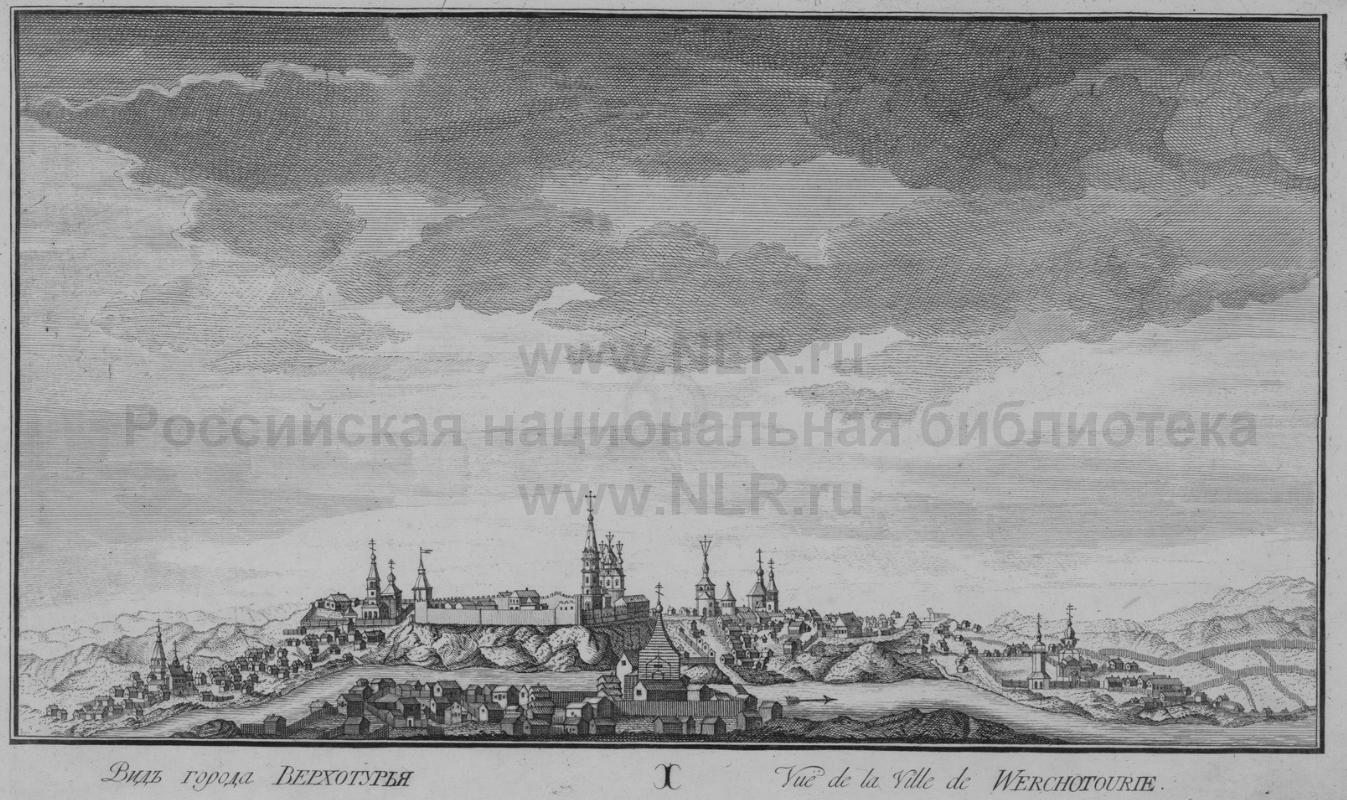 Вид города Верхотурья. Офорт, гравюра резцом. Взято из Собрания российских и сибирских городов. - Санкт-Петербург: 1769 - 1771.